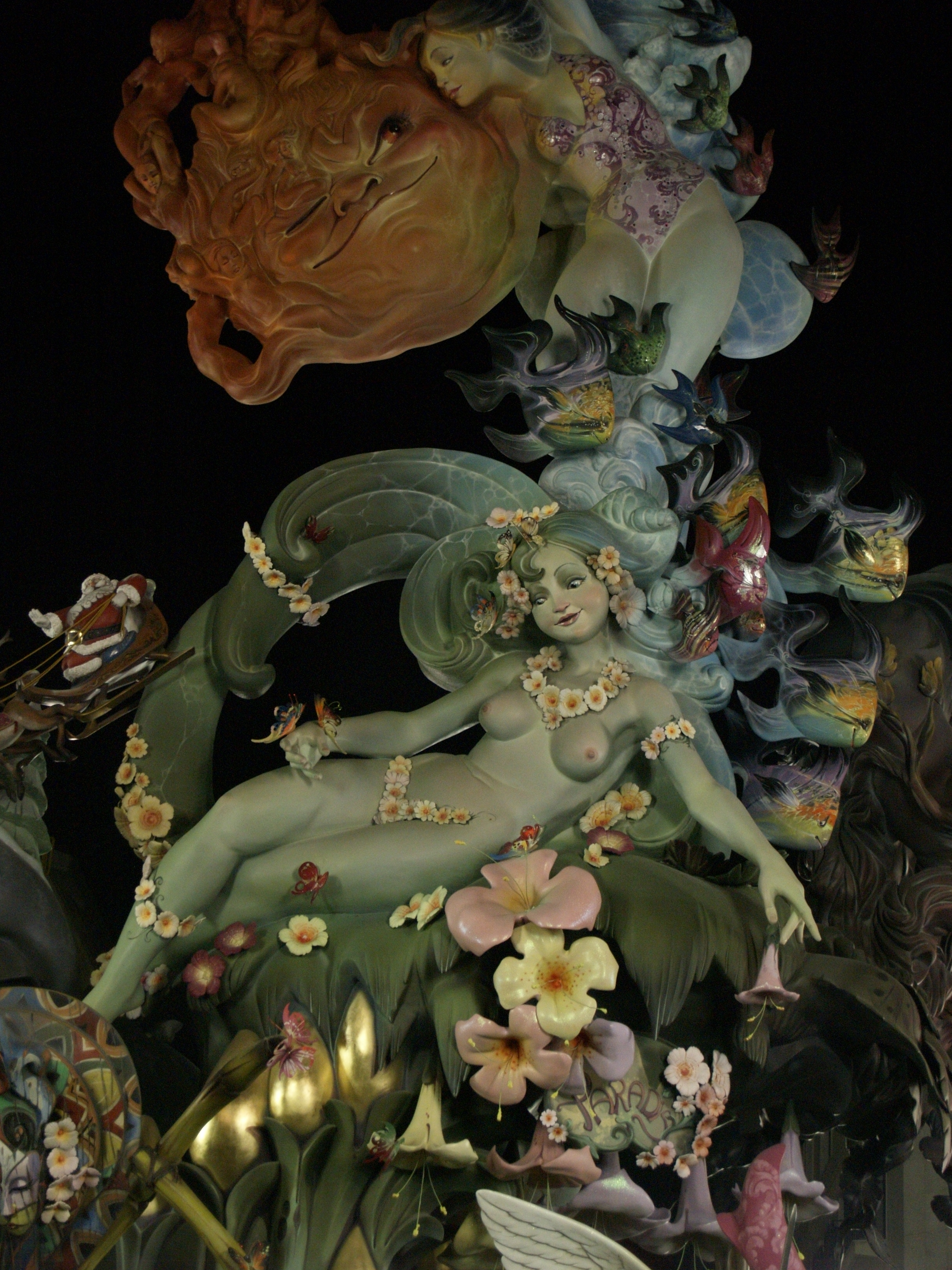 Falla de Convento Jerusalén, primer premio de la sección especial, fallas 2010, Valencia.